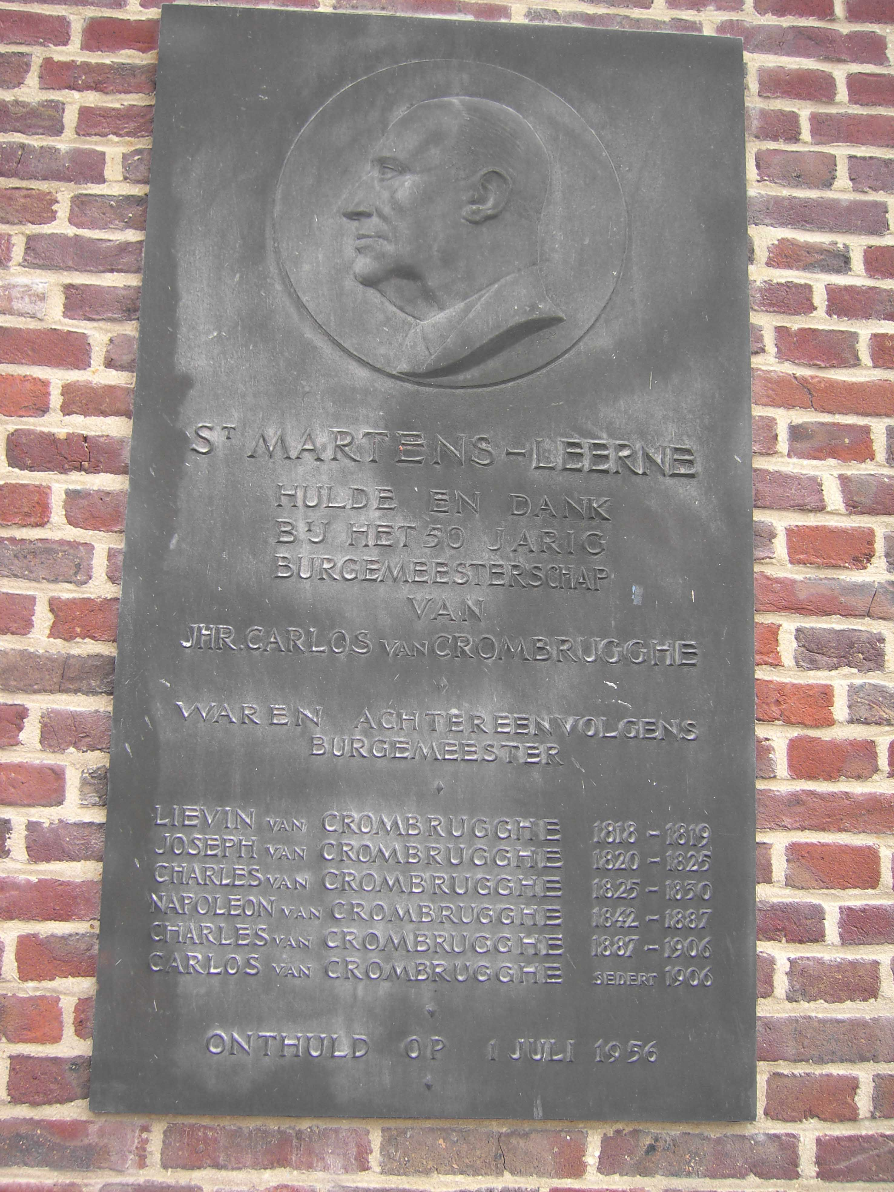 Bord aan de Sint-Martinuskerk te Sint-Martens-Leerne - Deinze - Oost-Vlaanderen - Vlaanderen - België. Huldiging van de burgemeester in 1956.